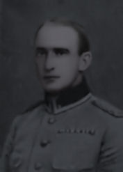 Luutnantti Elja Rihtniemi